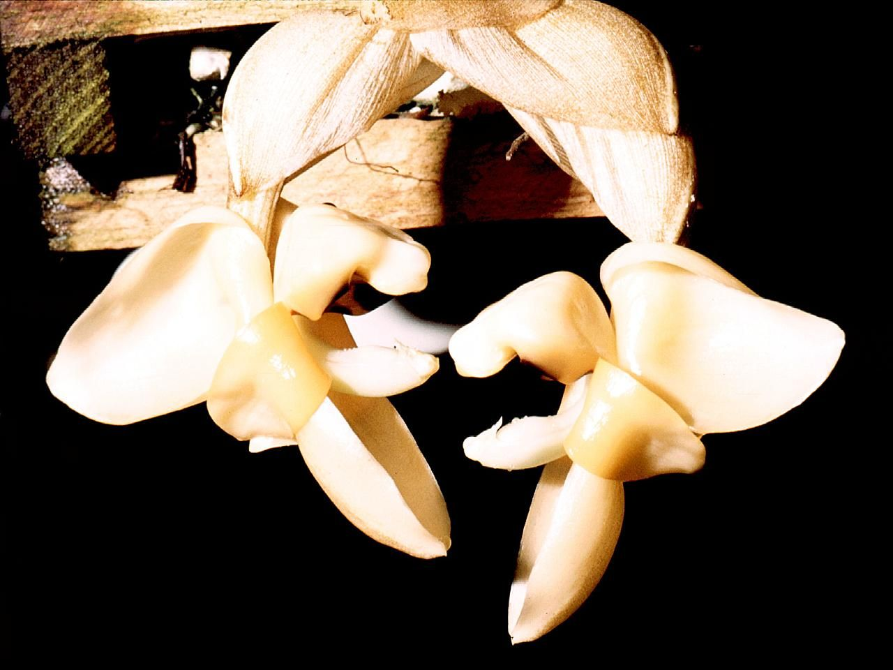 Stanhopea pulla